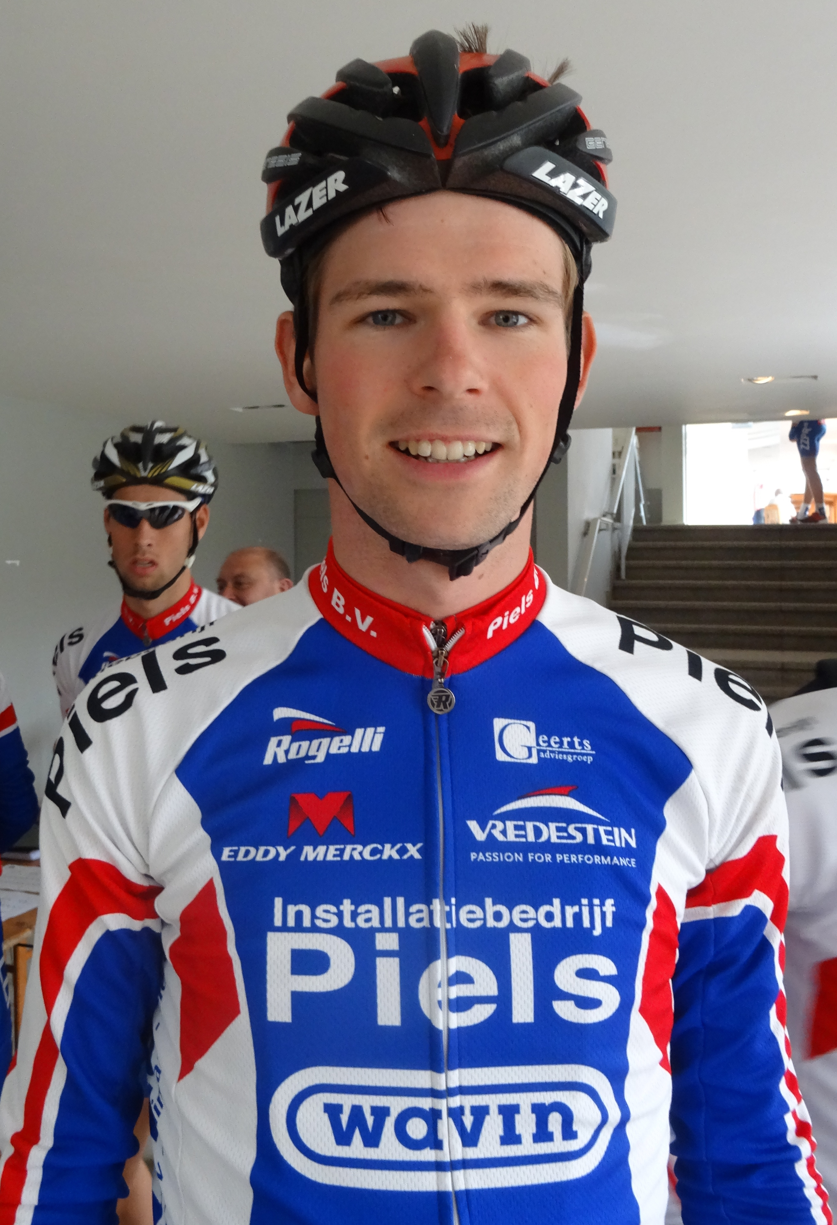 Reportage photographique réalisé le samedi 13 septembre à l'occasion du départ et de l'arrivée de la Flèche côtière 2014 à Heist (Knokke-Heist), Belgique.